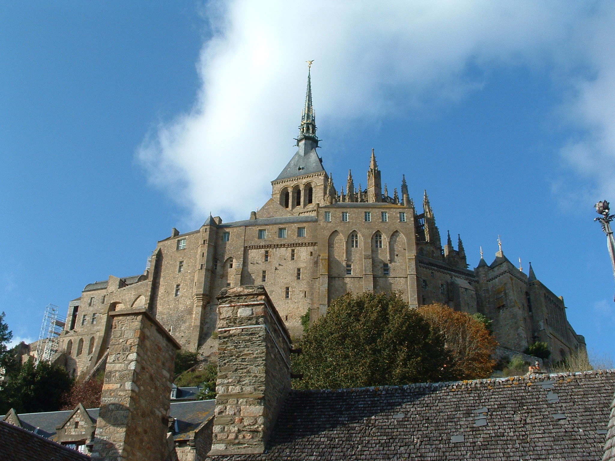 Abbaye du Mont Saint Michel - Merveille du monde